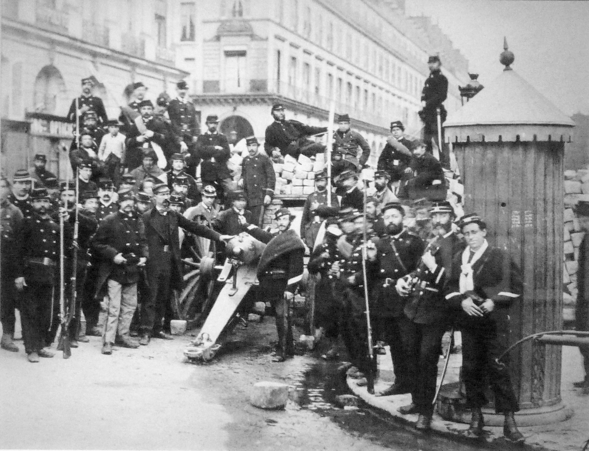 Exposition La Commune de Paris à l'Hôtel de Ville de Paris (18 mars - 28 mai 2011) - Barricade sur la place Vendôme au débouché de la rue de Castiglione - Photo de Bruno Braquehais, bibliothèque historique de la Ville de Paris.